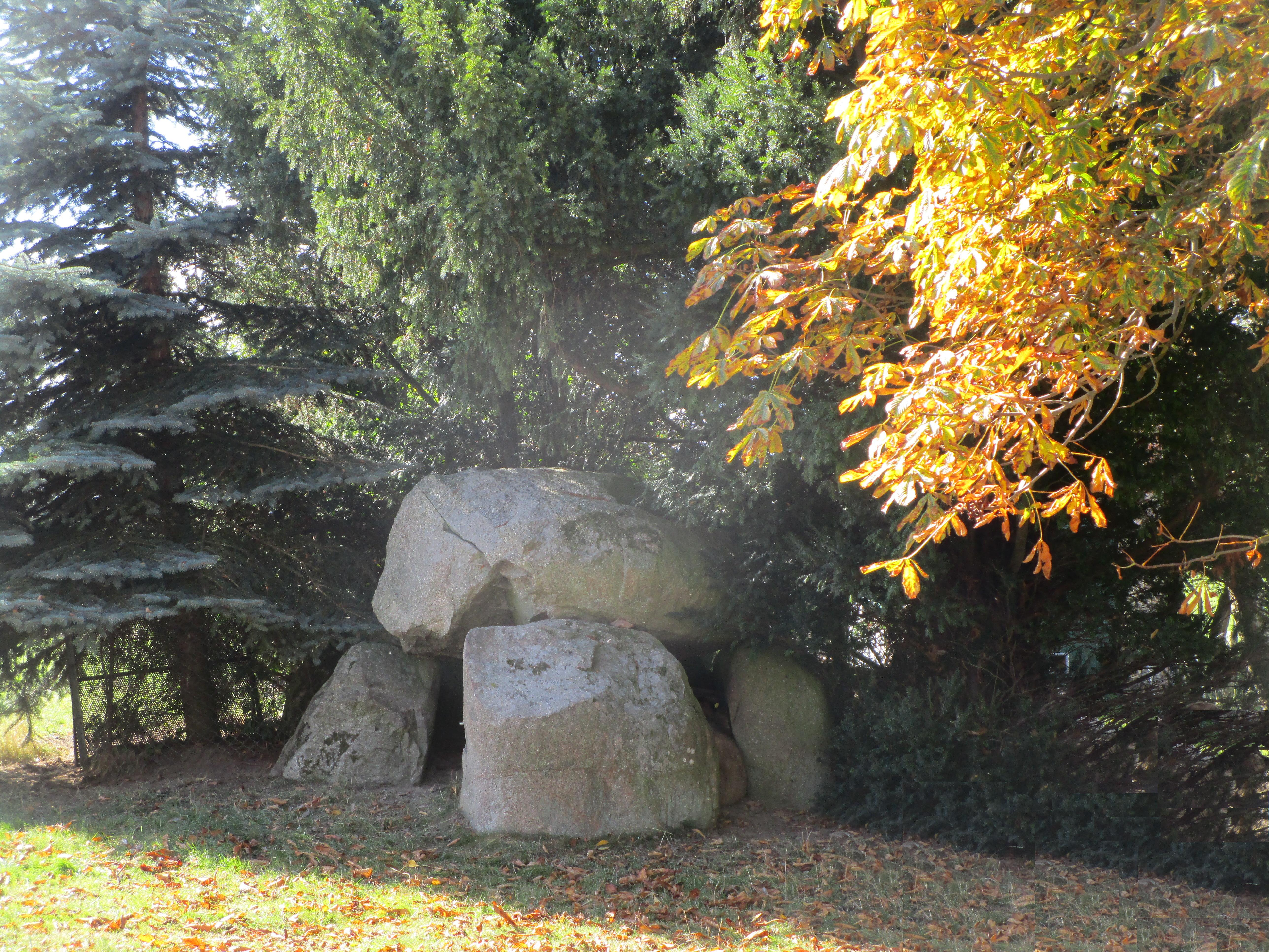 Großsteingrab Klein Polzin 2 Sprockhoff-Nr. 560